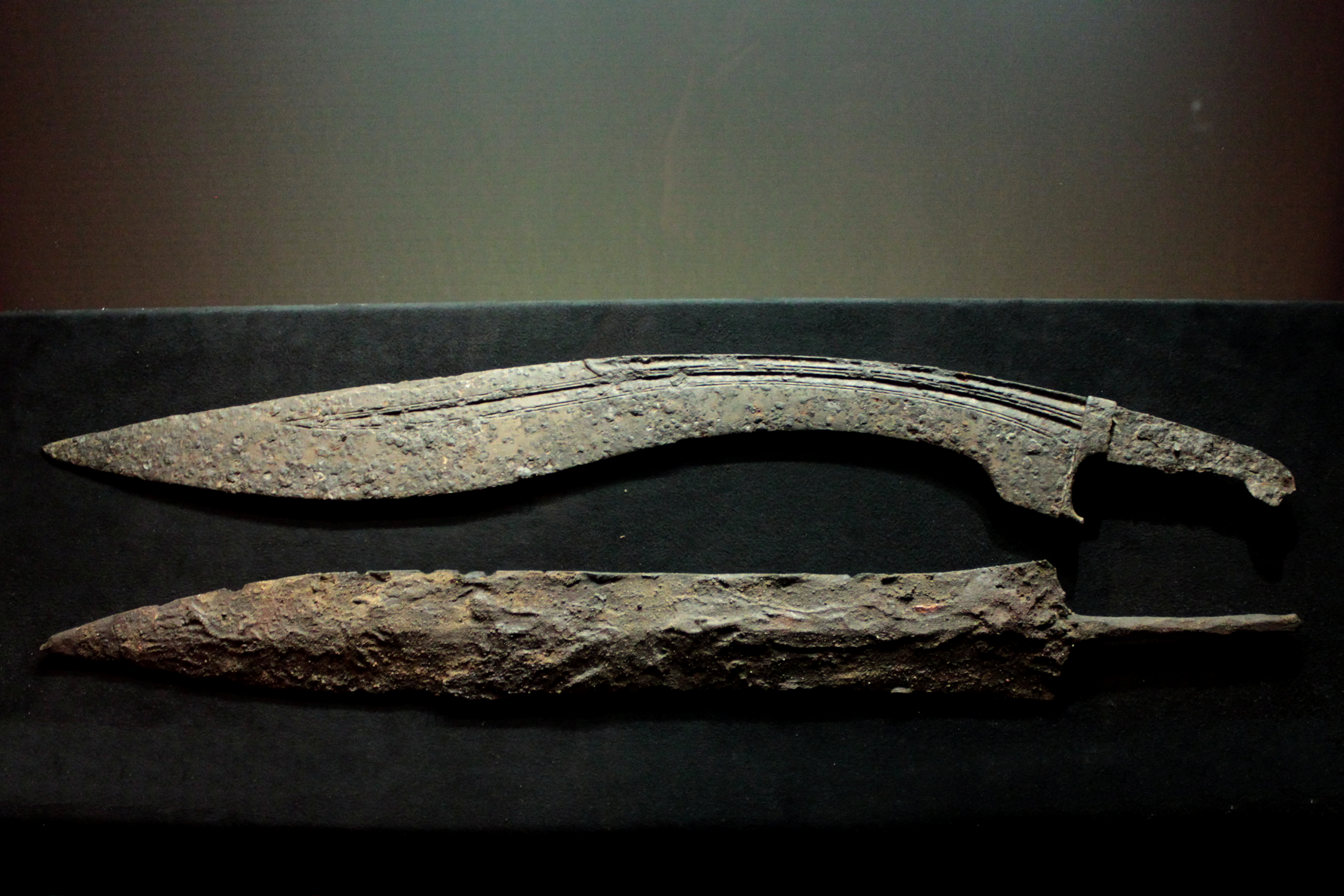 Falcata ibera perteneciente a la Bastida de Les Alcusses (Moixent) del siglo IV aC y réplica de un gladius romano. Depositadas en el Museo de prehistoria de Valencia, Comunidad valenciana, España.